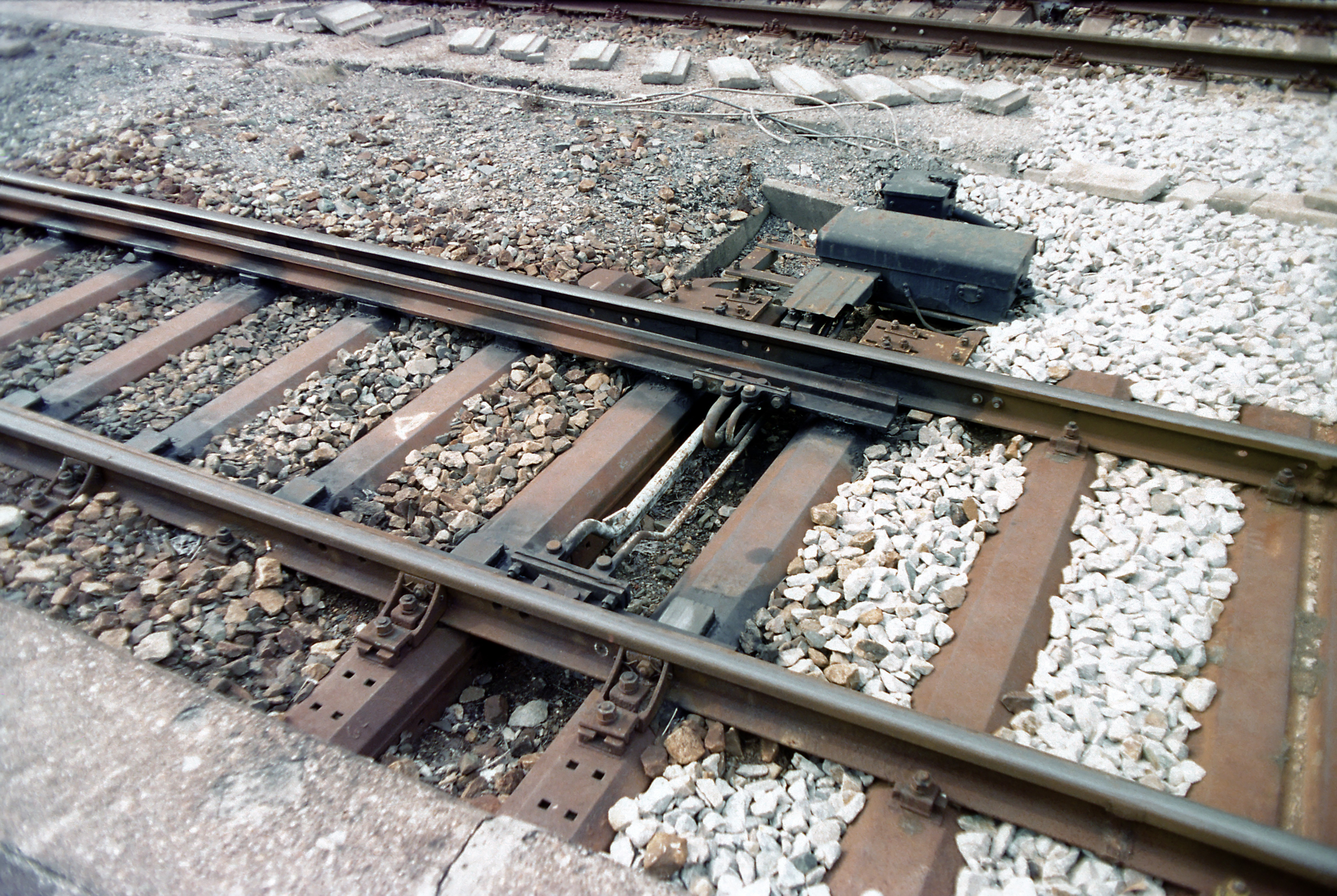 Für EZMG-Stellwerke ursprünglich typisch waren die Weichenantriebe mit Innenverschluss. Einen sonst üblichen Spitzenverschluss gibt es nicht. Die dicken Stangen bewegen die Zungen, die dünneren sind die Prüferstangen.